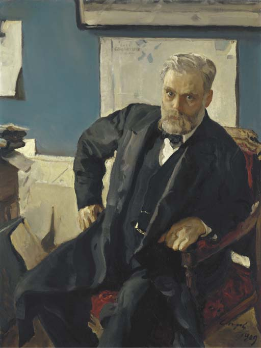 Portrait d'Emanuel Nobel par Valentin Alexandrovich Serov, 1909 VALENTIN ALEXANDROVICH SEROV (1865-1911) Portrait of Emmanuel Nobel (1859-1932) signed in Russian and dated 'Serov 909' (lower right) oil on canvas 47¾x36¼in. (121.2x92cm.)